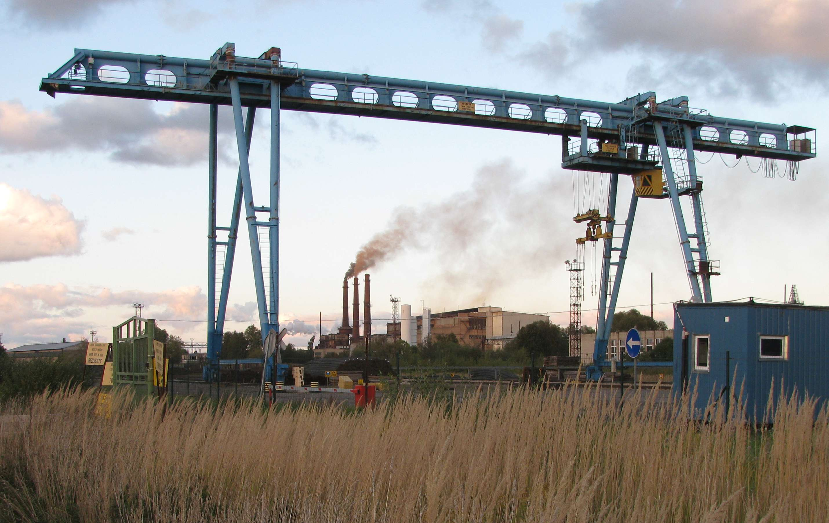 Pohled na Siemens-Martinovu ocelárnu v závodě Liepājas metalurgs